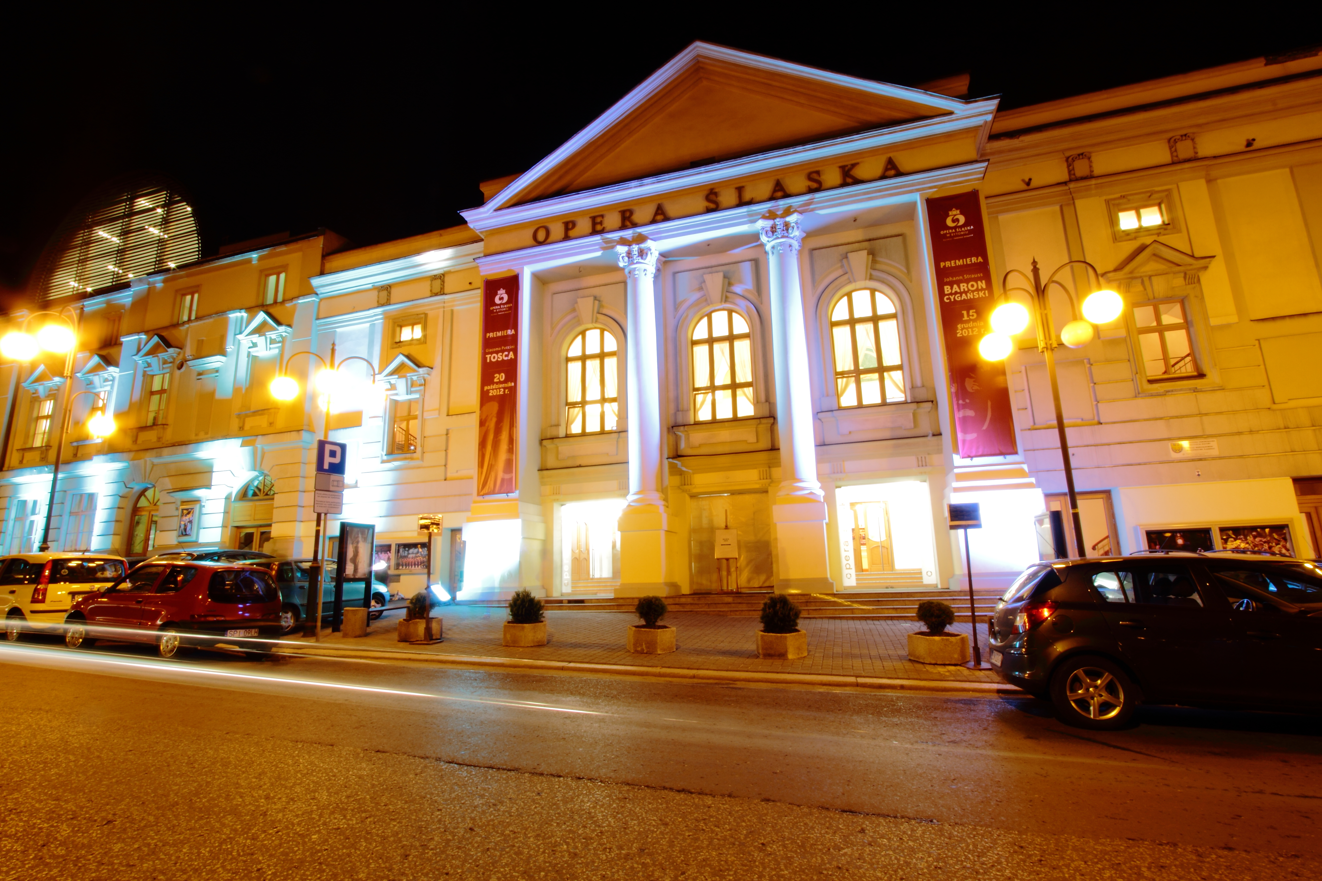 100-letni gmach teatru miejskiego zbudowany w latach 1899-1901